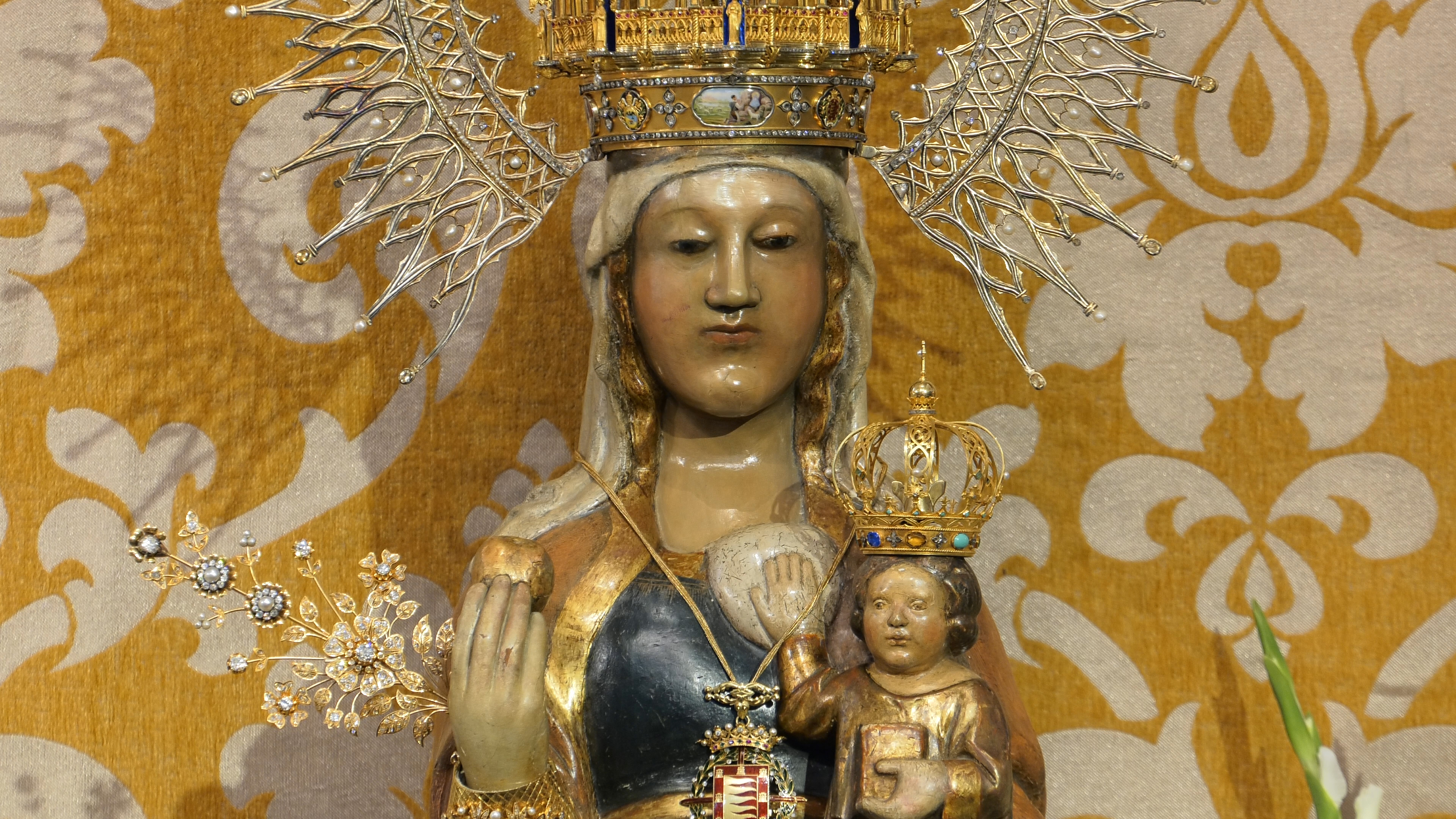 2-9-2018 - Misa Institucional y ofrenda floral en honor de la Virgen de San Lorenzo de Valladolid.